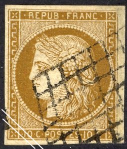 Cérès premier émission, 10 c. bistre jaune.